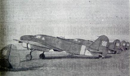 Zrakoplovi NDH na Borongaju